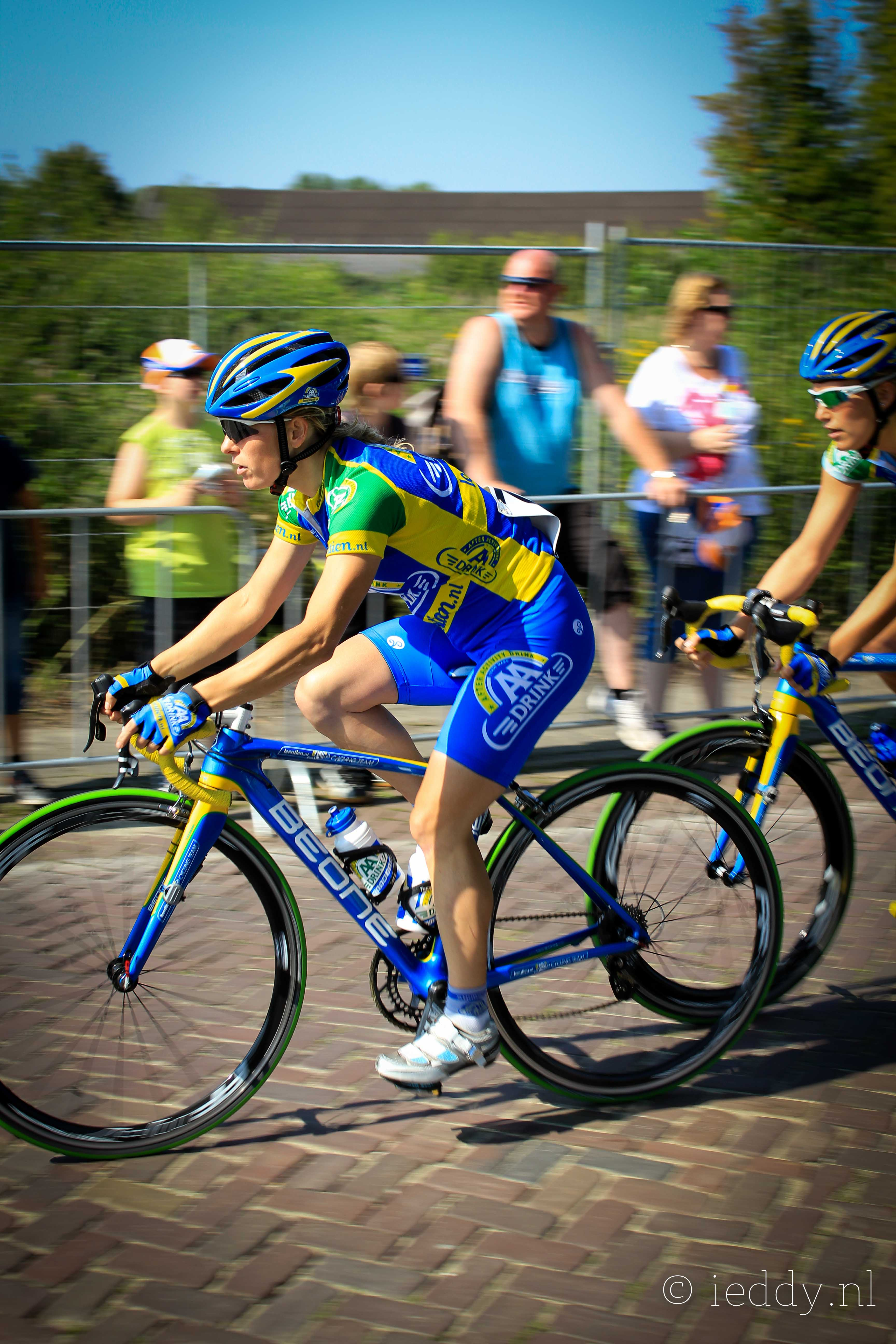 Daphny van den Brand Draai van de Kaai 2011